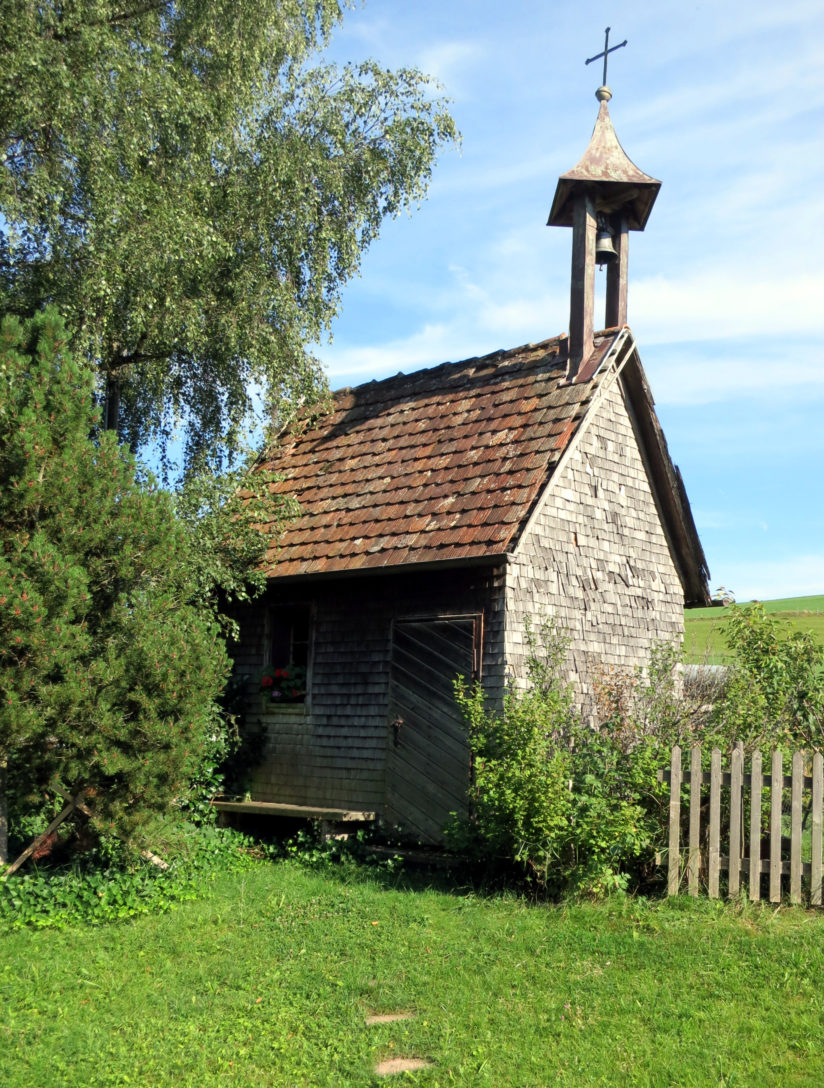 Außenansicht der Hofkapelle in Kolben, Gemeinde Wiggensbach